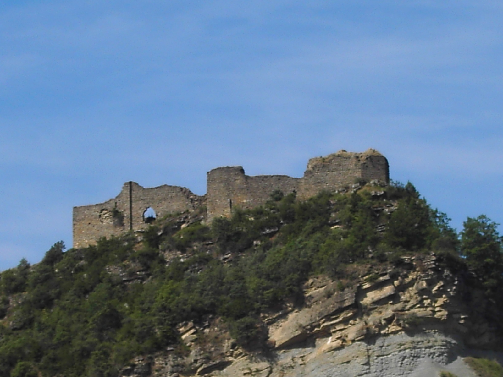 El Castillo de Boltaña, visto desde el Barranco de Cañimás, justo detrás del núcleo urbano.